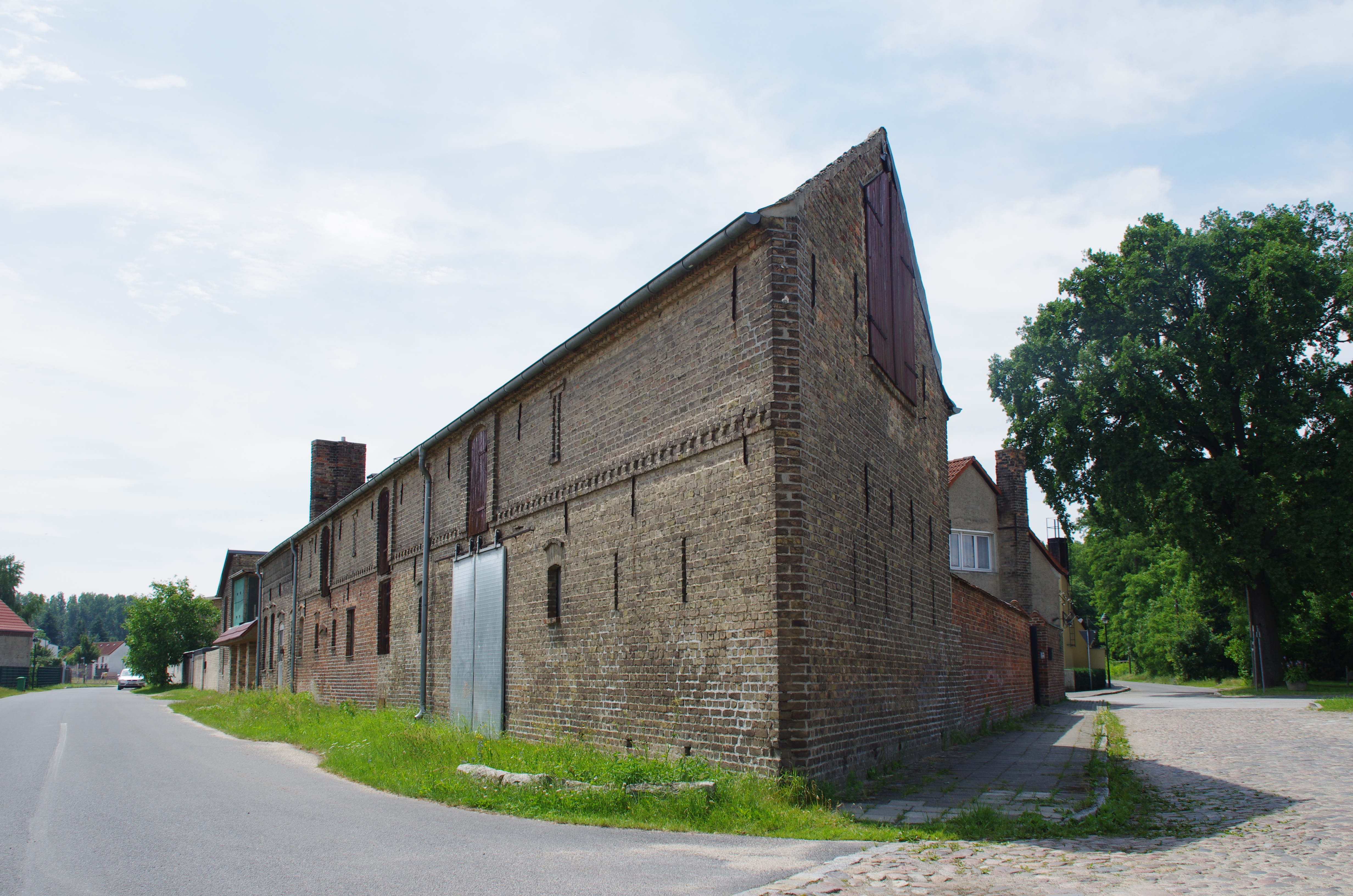 Trebbin Ortsteil Löwendorf in Brandenburg. Die alte Schmiede in der Dorfstraße 11 steht unter Denkmalschutz.